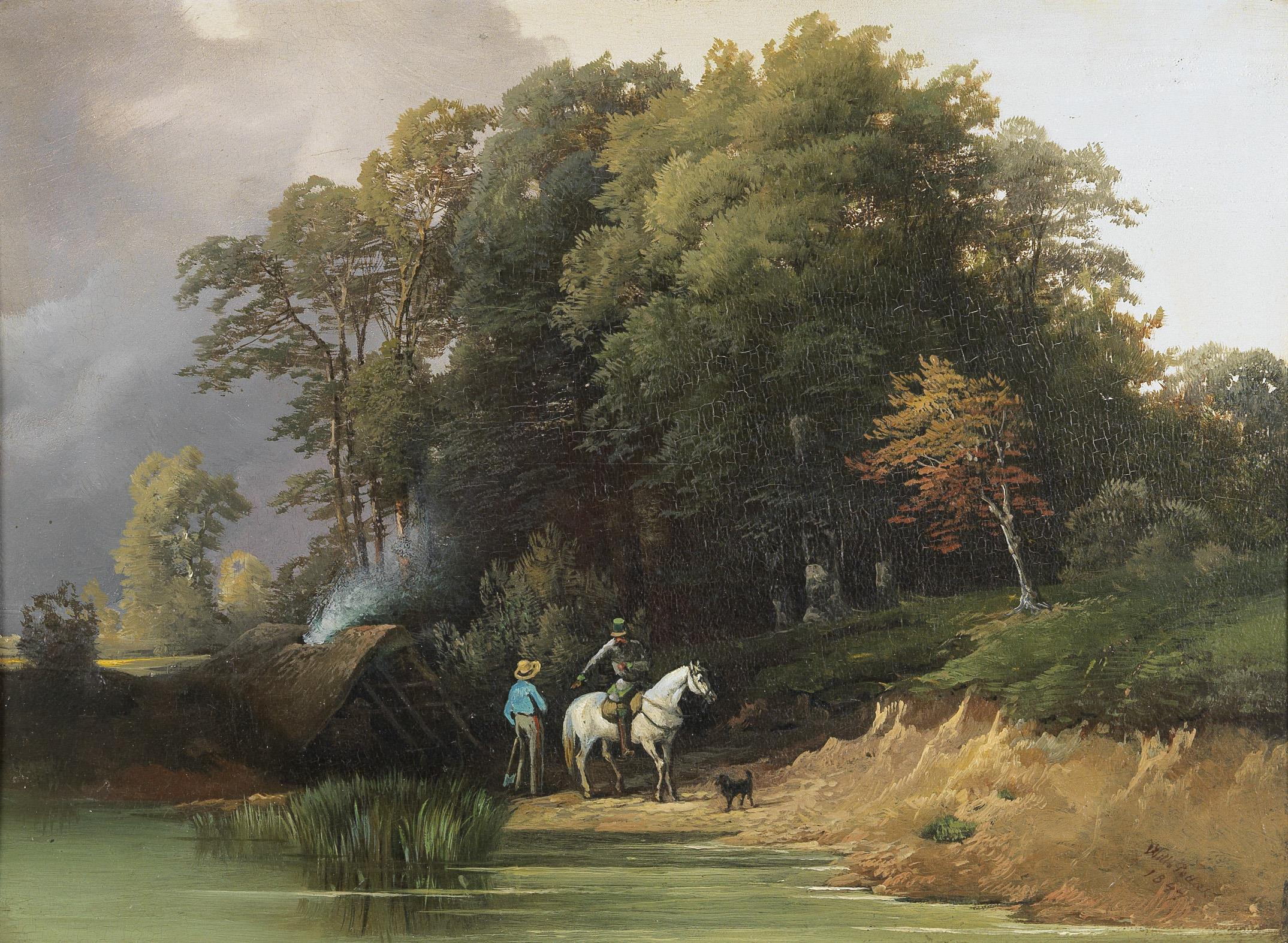 Der Postbote beim Köhler, signiert, datiert Wilh. Pollak, Öl auf Holz, 23,5 x 31 cm